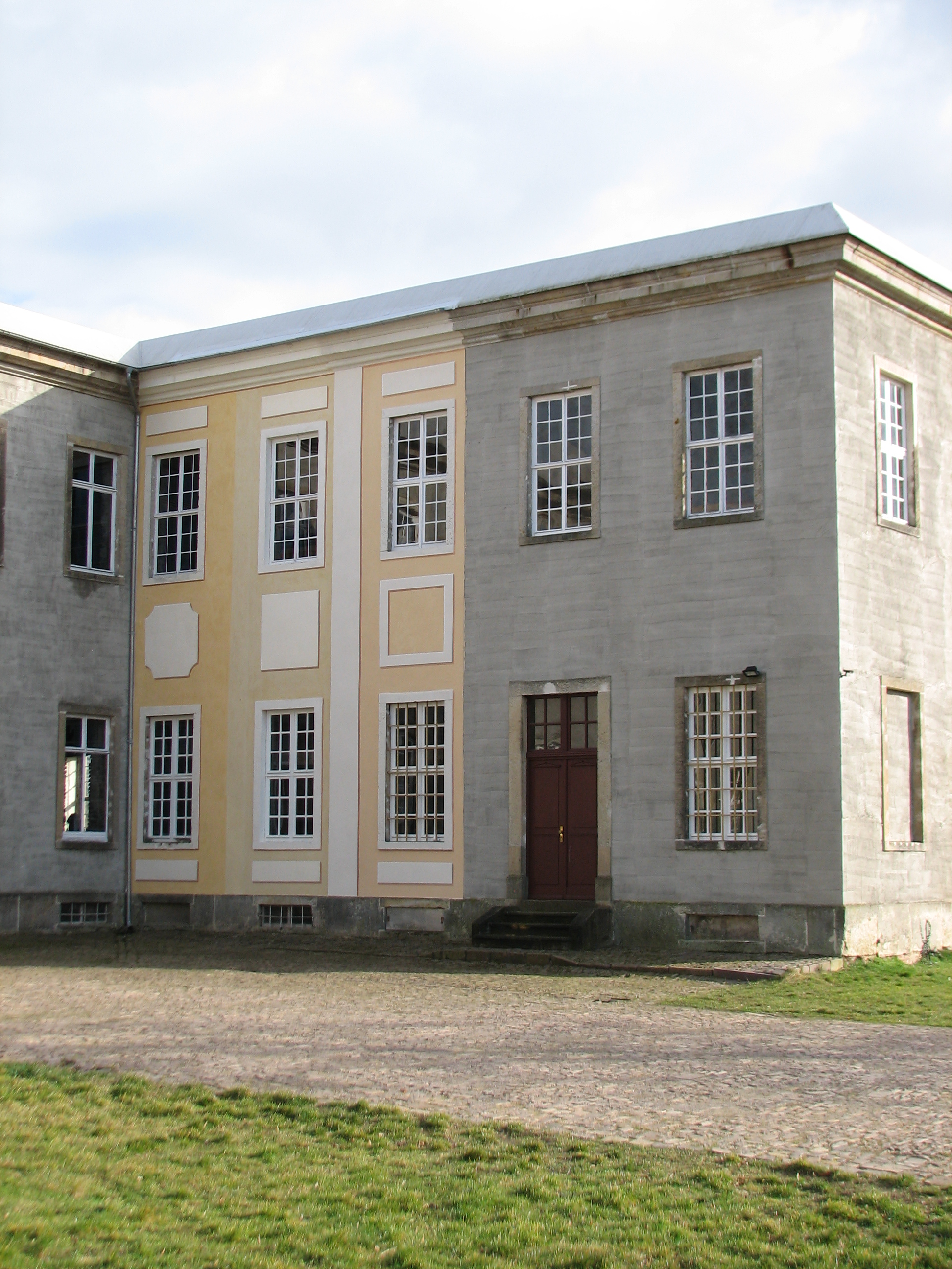 Fassadenproben am ansonsten roh verputzten Bauwerk